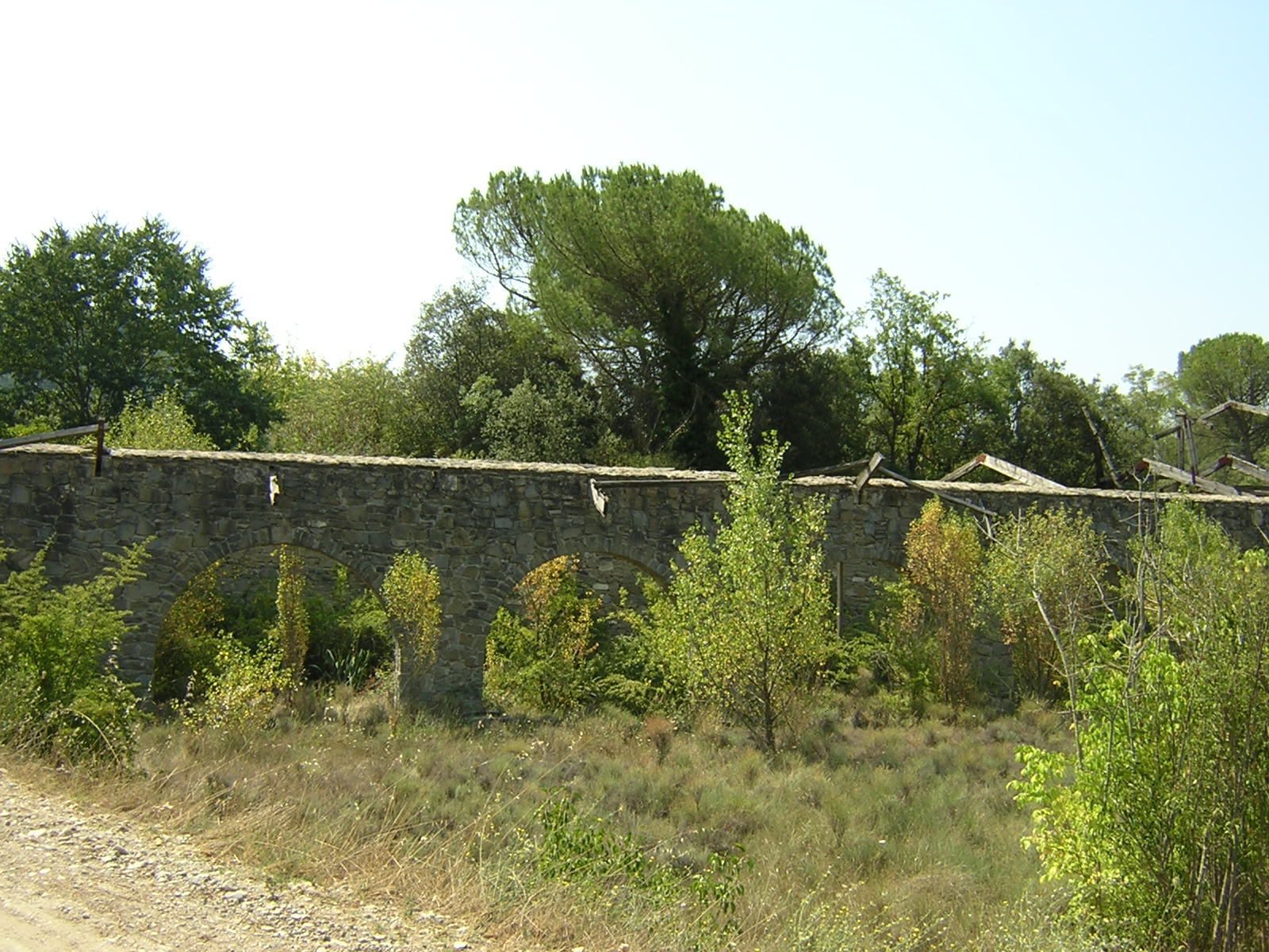 L'estació de la Coma (Monistrol de Calders, Moianès)